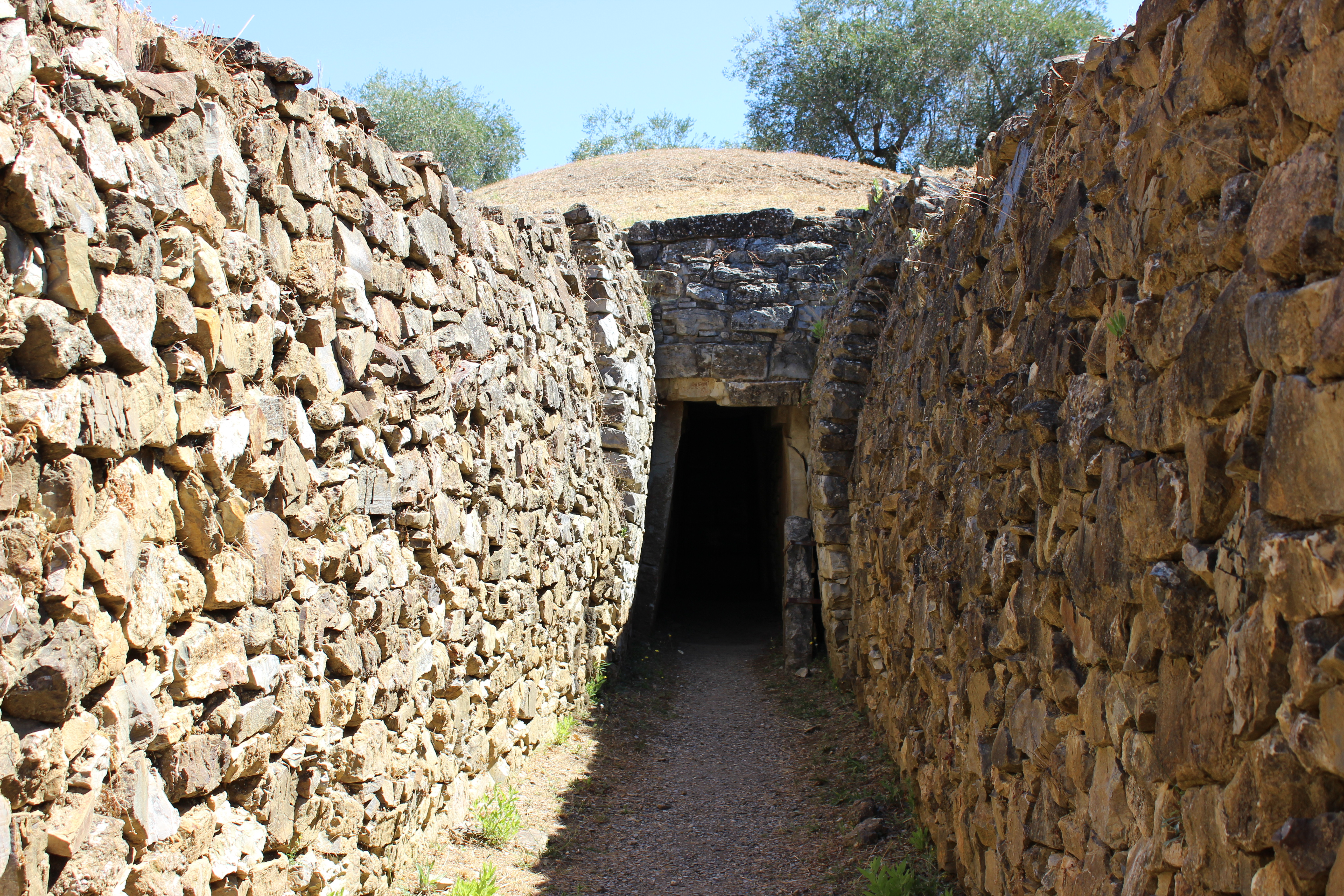 Eingang zur Grabkammer des Tomba del Diavolino II bei Vetulonia, ein etruskisches Tumulusgrab aus dem späten 7. Jh. v. Chr.